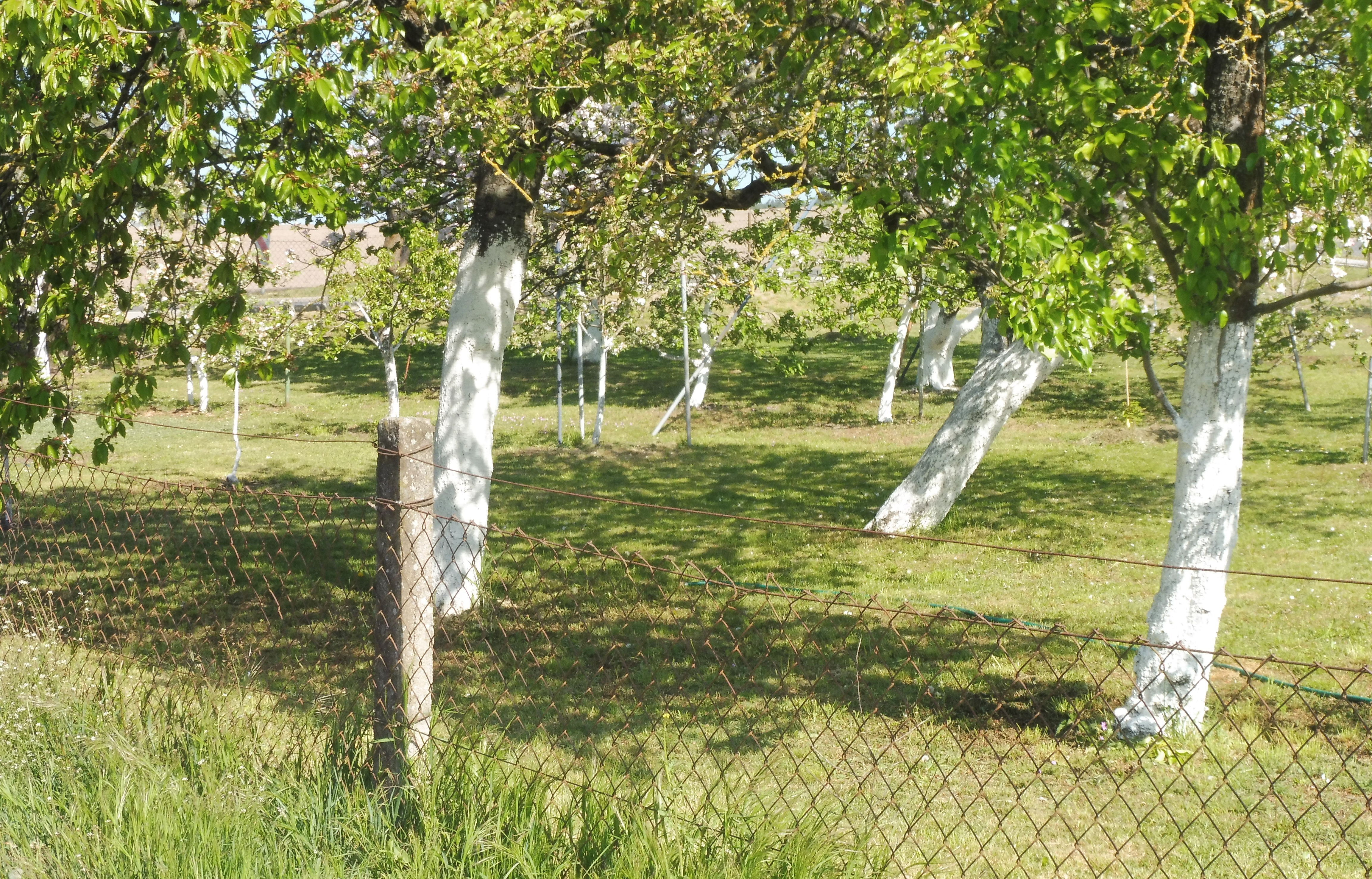 Alter Obstgarten mit gekalkten Bäumen